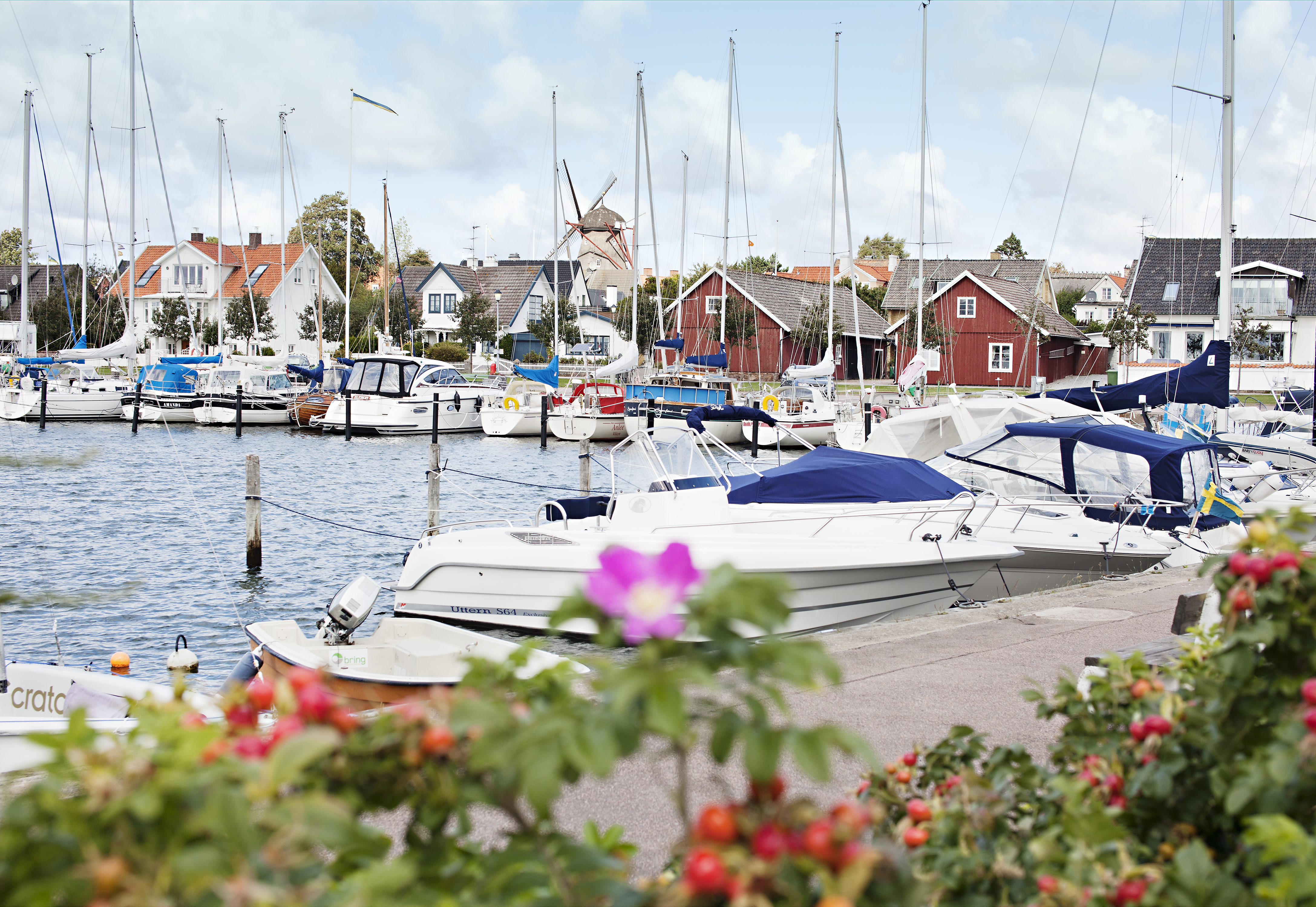 Båtar i hamnen i Viken.